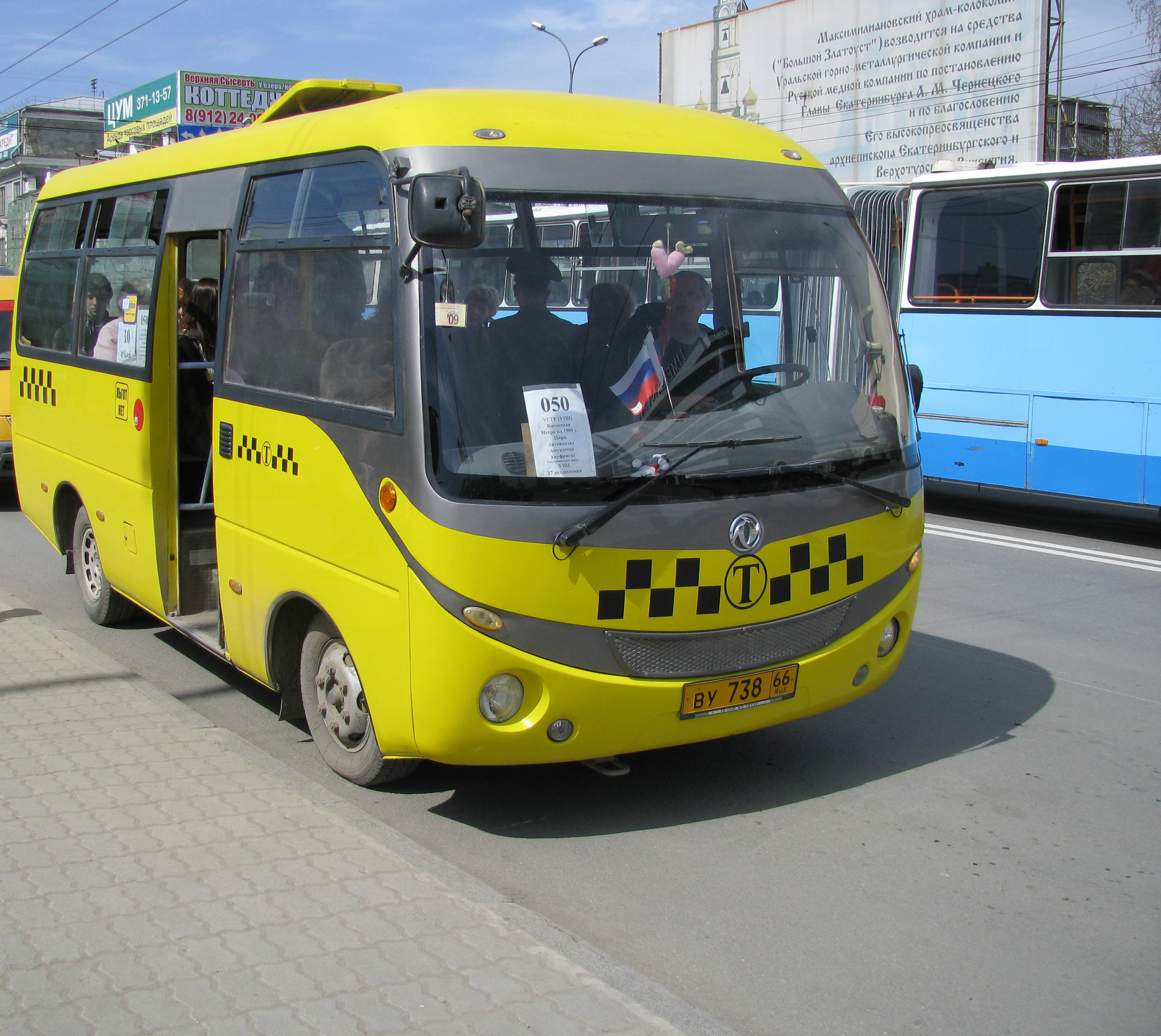 Маршрутное такси 050 маршрута в Екатеринбурге